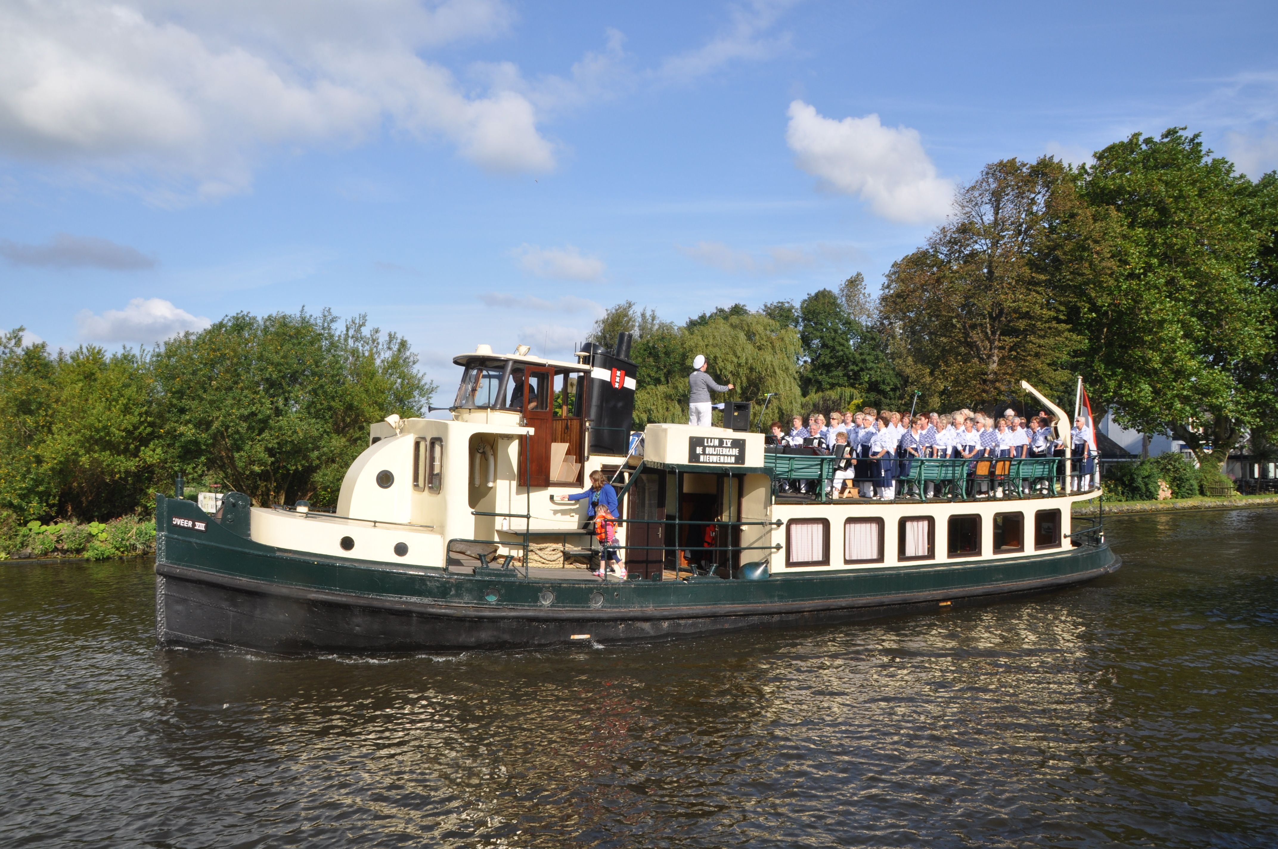 IJveer VIII op de Vliet. Bouwjaar 1922